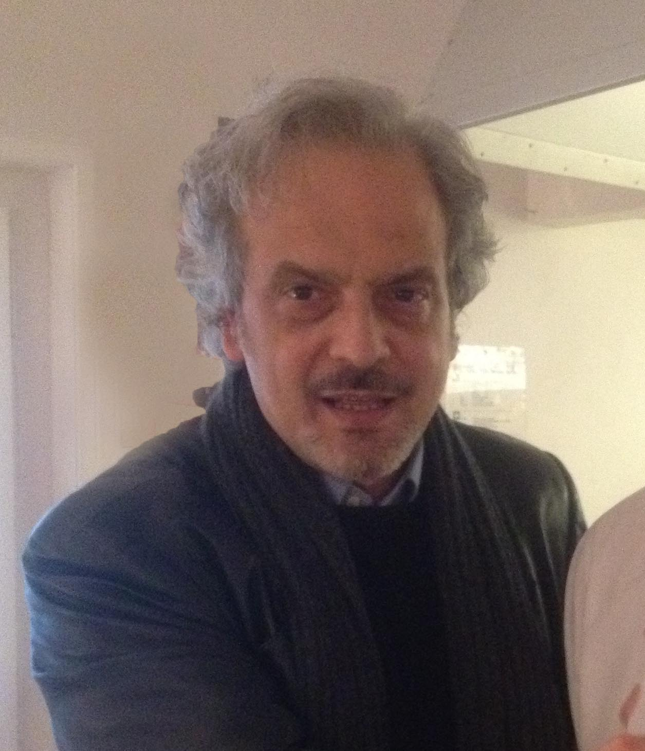 Giorgio Battistelli à Genève